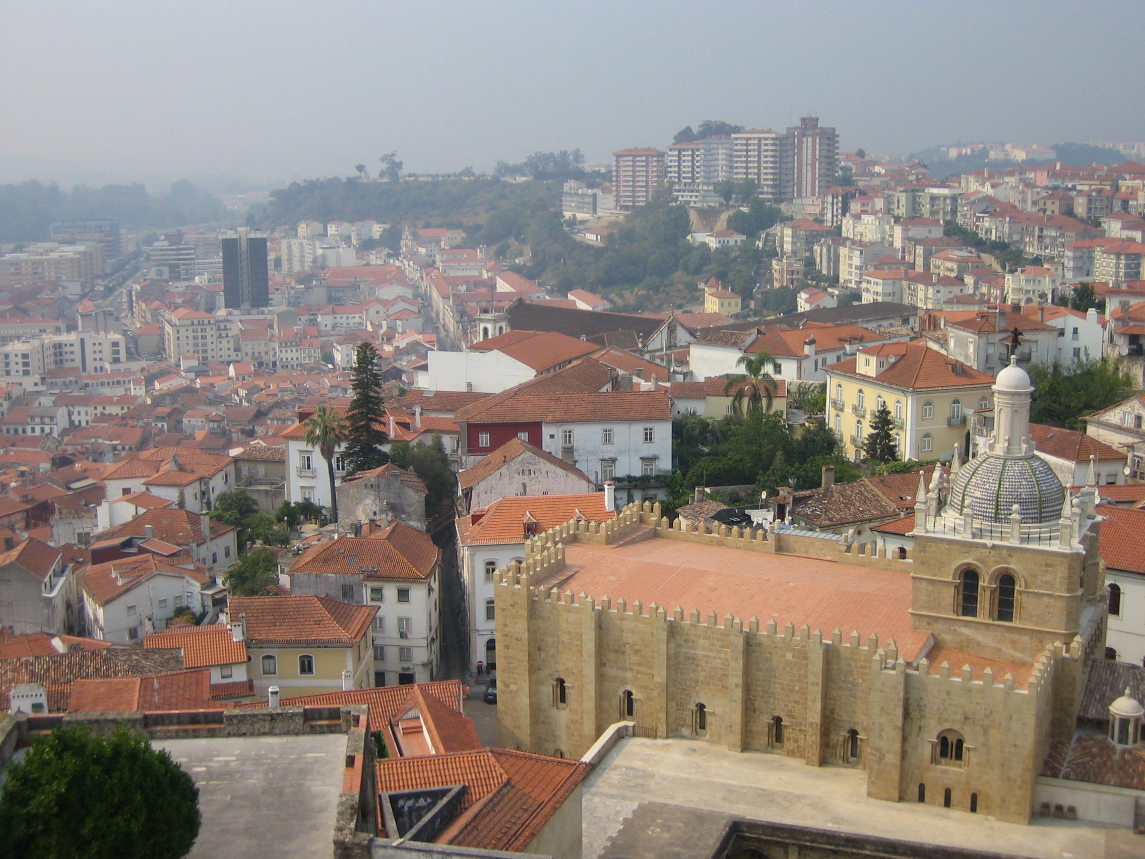 Sé Velha de Coimbra - Portugal Author: Raph Date: 5 August 2005